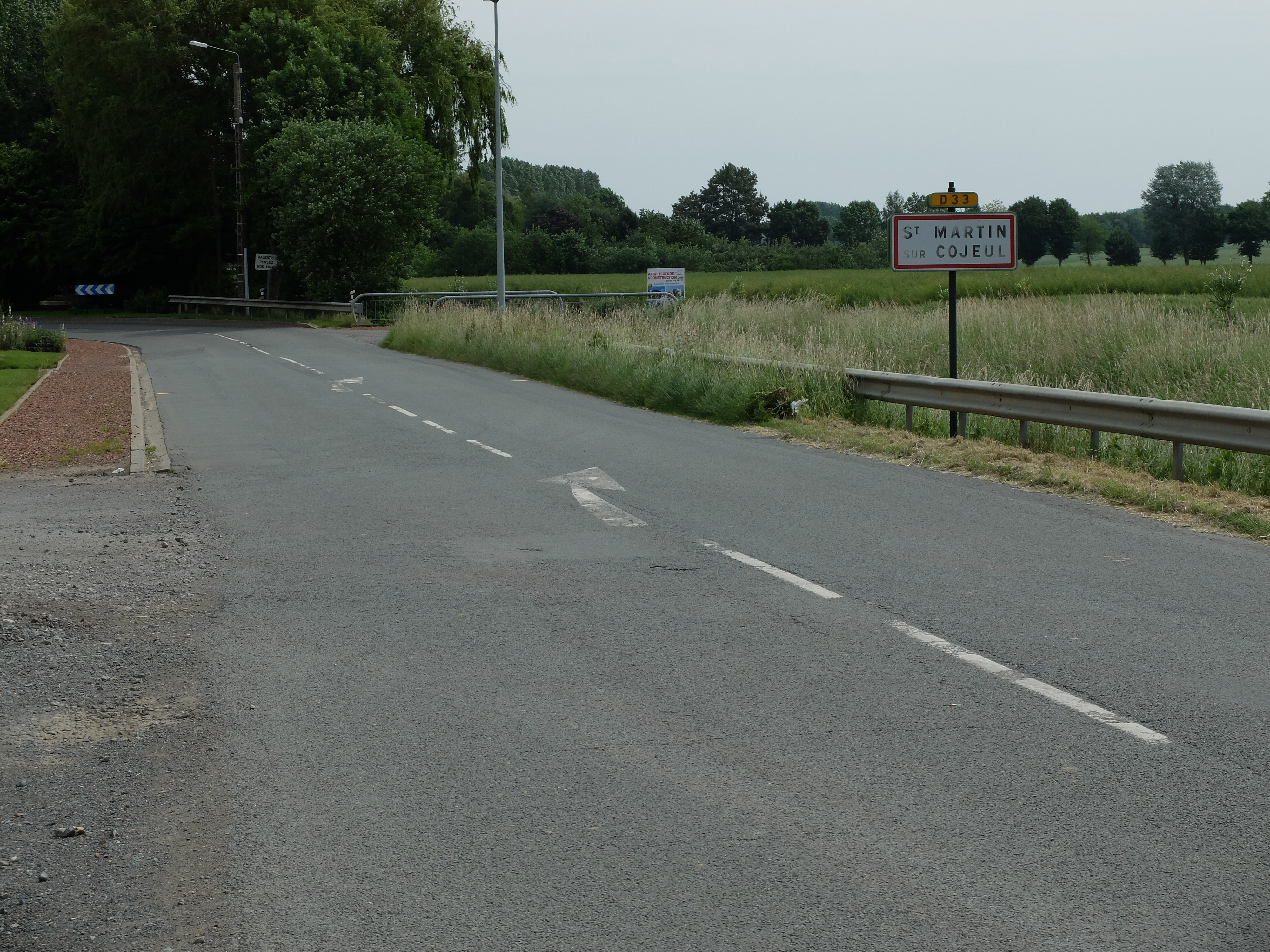 Vue d'une entrée de la commune de Saint-Martin-sur-Cojeul.